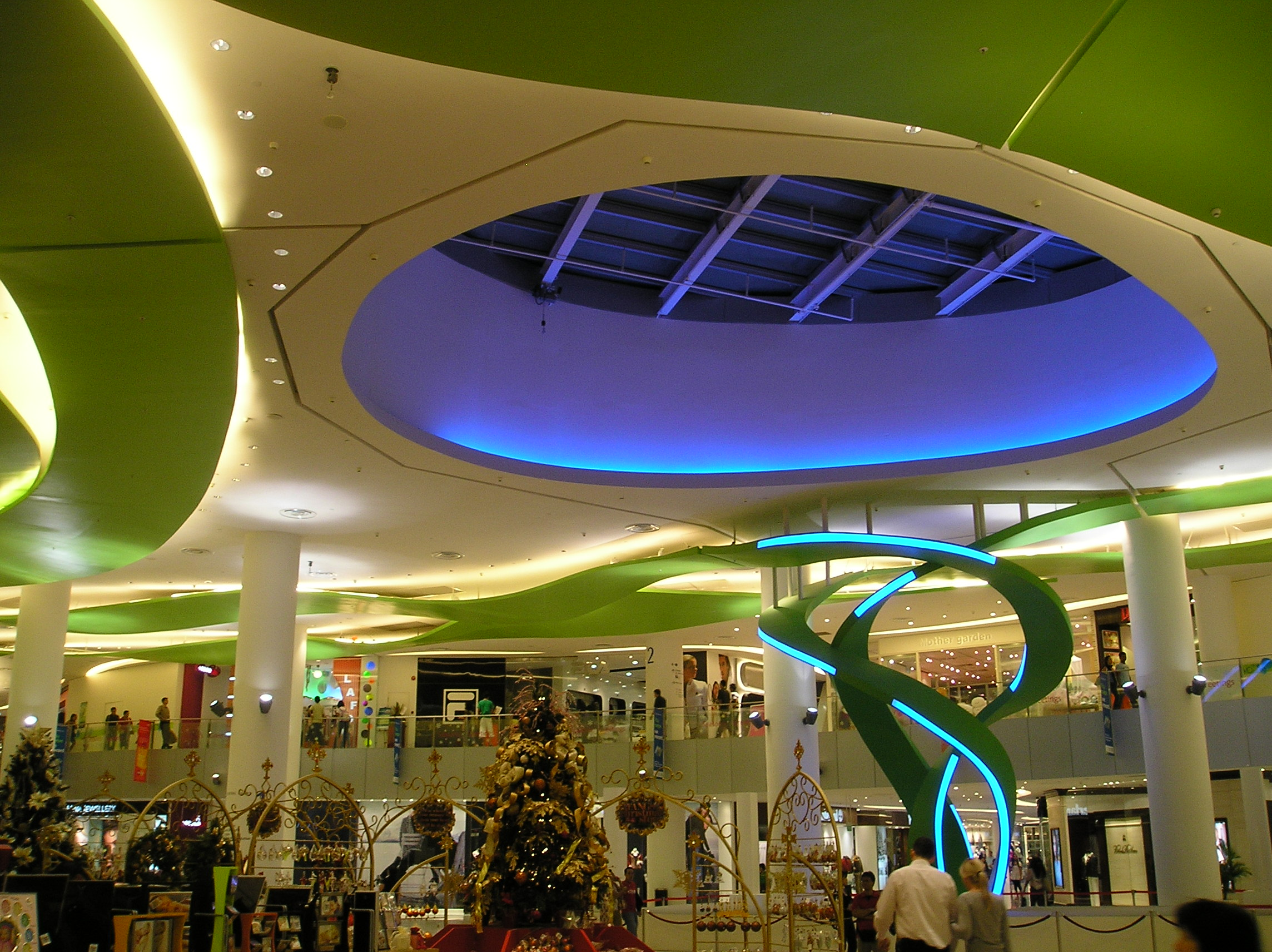 Picture taken in VivoCity Center in Singapore, December 06/Photo prise à l'intérieur de VivoCity Center à Singapour, Decembre 06